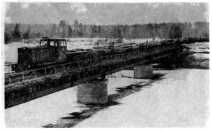 мост